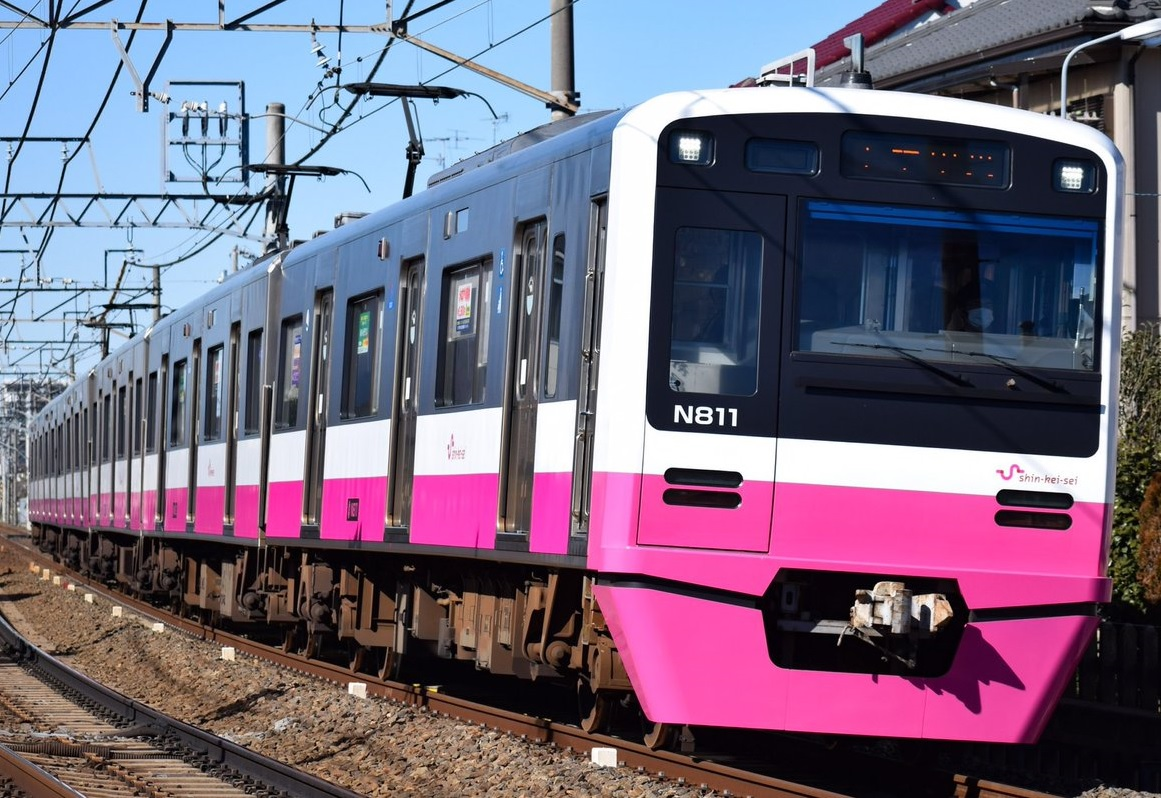 新京成N800形818編成 普通千葉中央行き